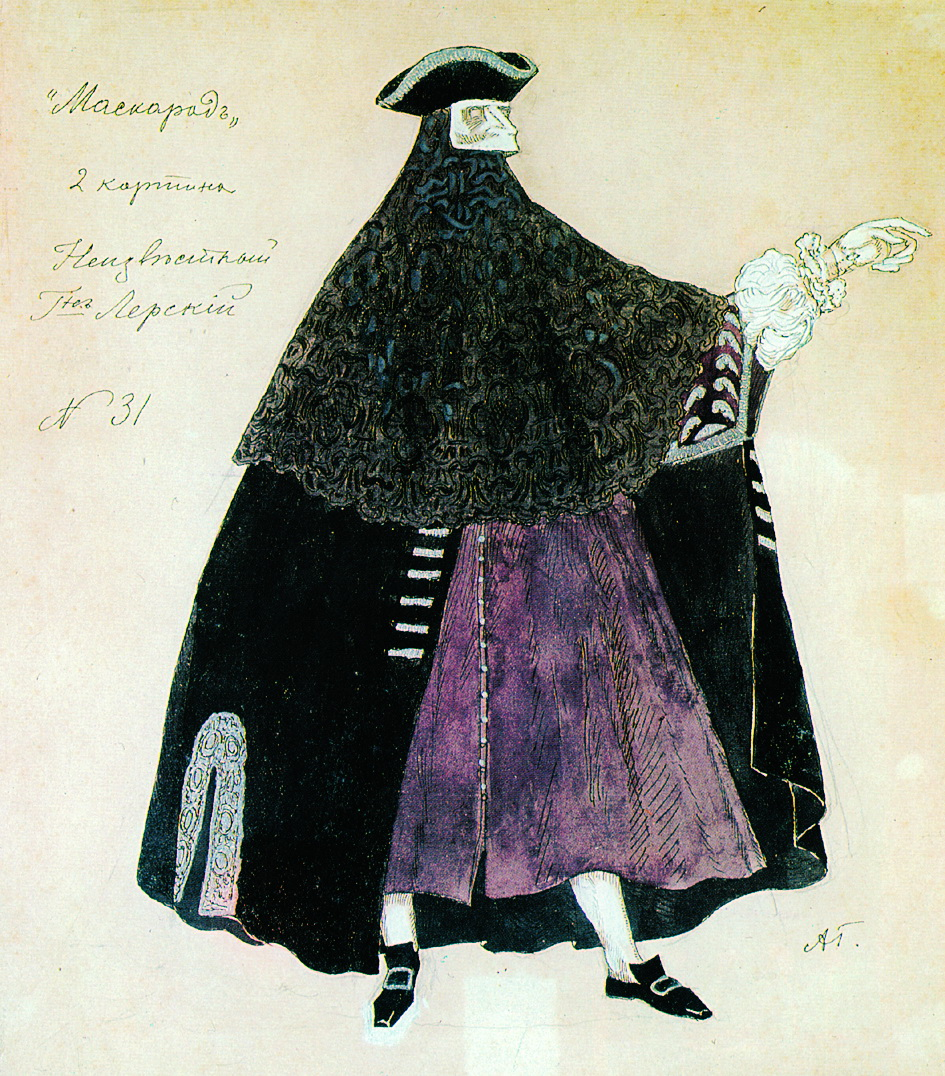 Баута. Неизвестный. 1917 Эскизы костюмов к драме М.Ю. Лермонтова "Маскарад" Государственный музей театрального и музыкального искусства